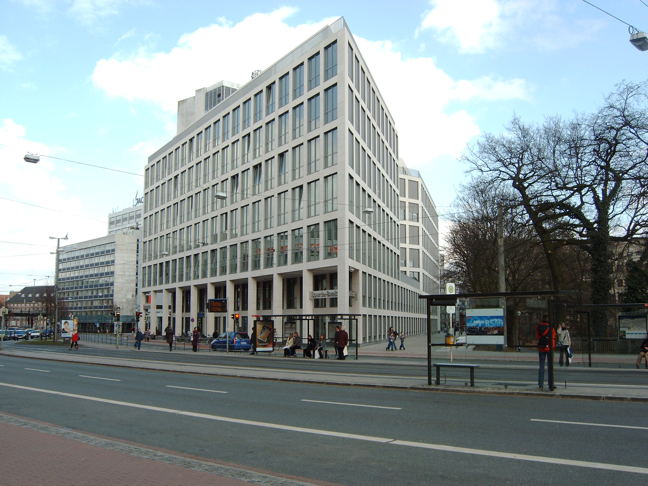 Herdentorsteinweg Bremen, Germany Down town